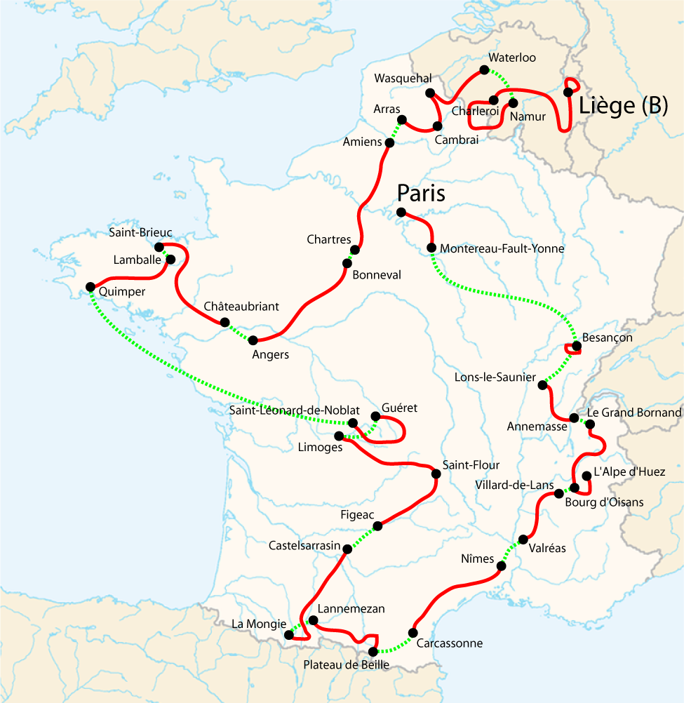 Tour de France 2004